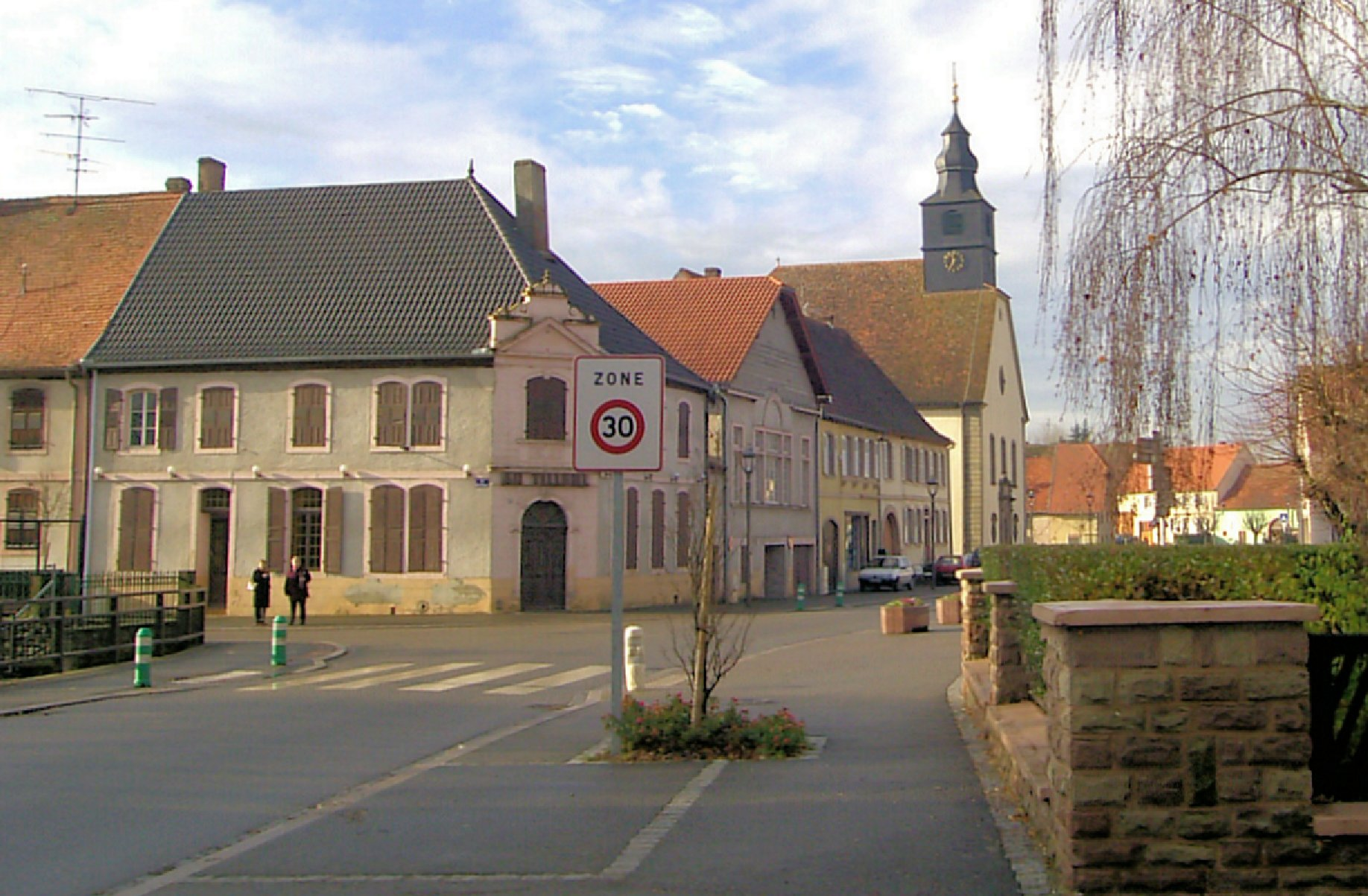 La Rue d’Altwiller de Harskirchen avec l'église protestante